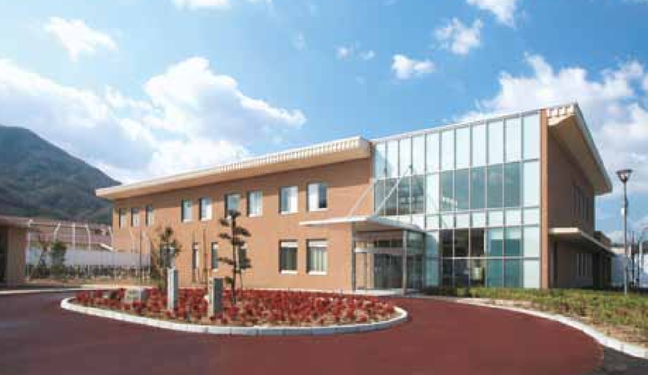 四国少年院 香川県善通寺市善通寺町2020